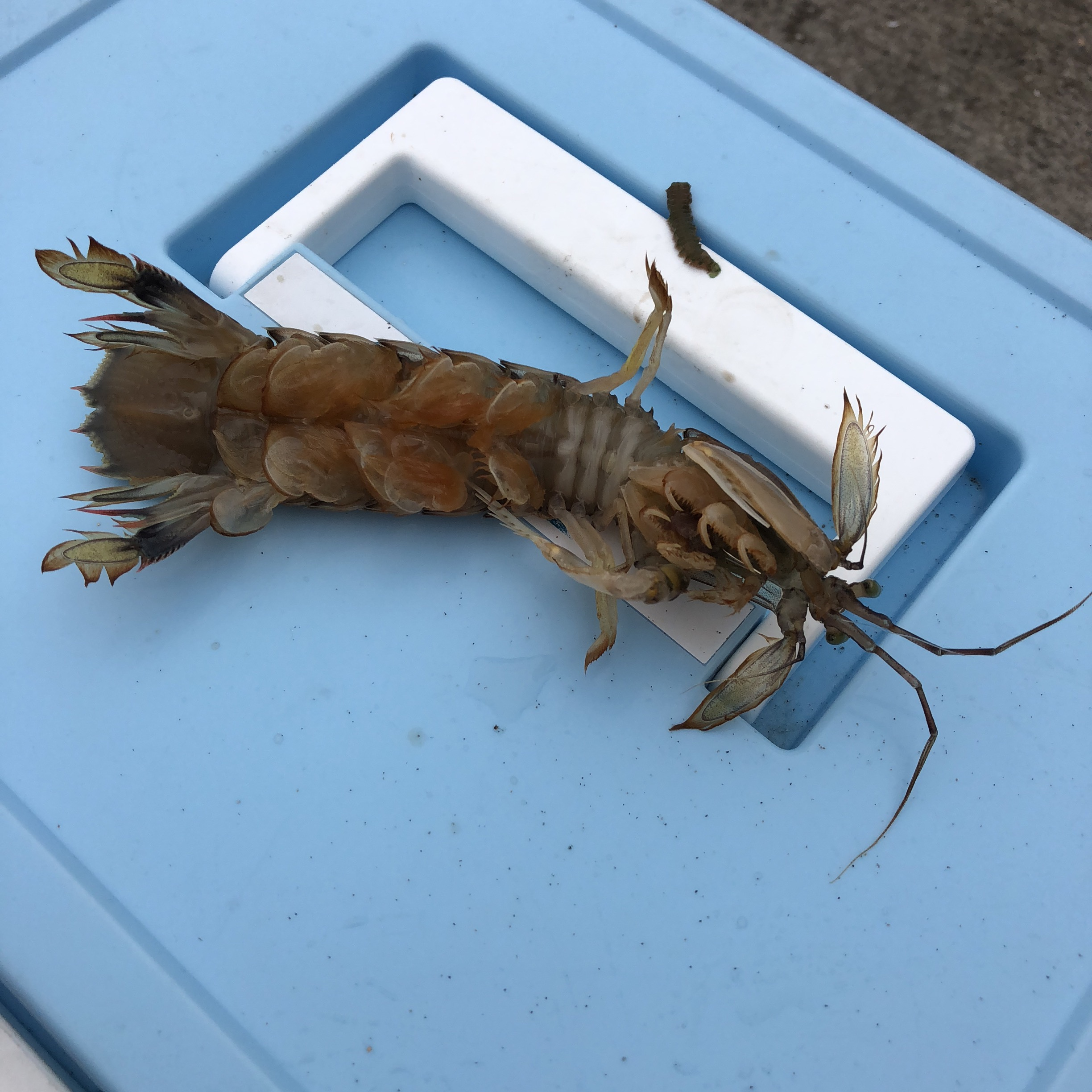 シャコ 2018.8.13 那珂湊漁港